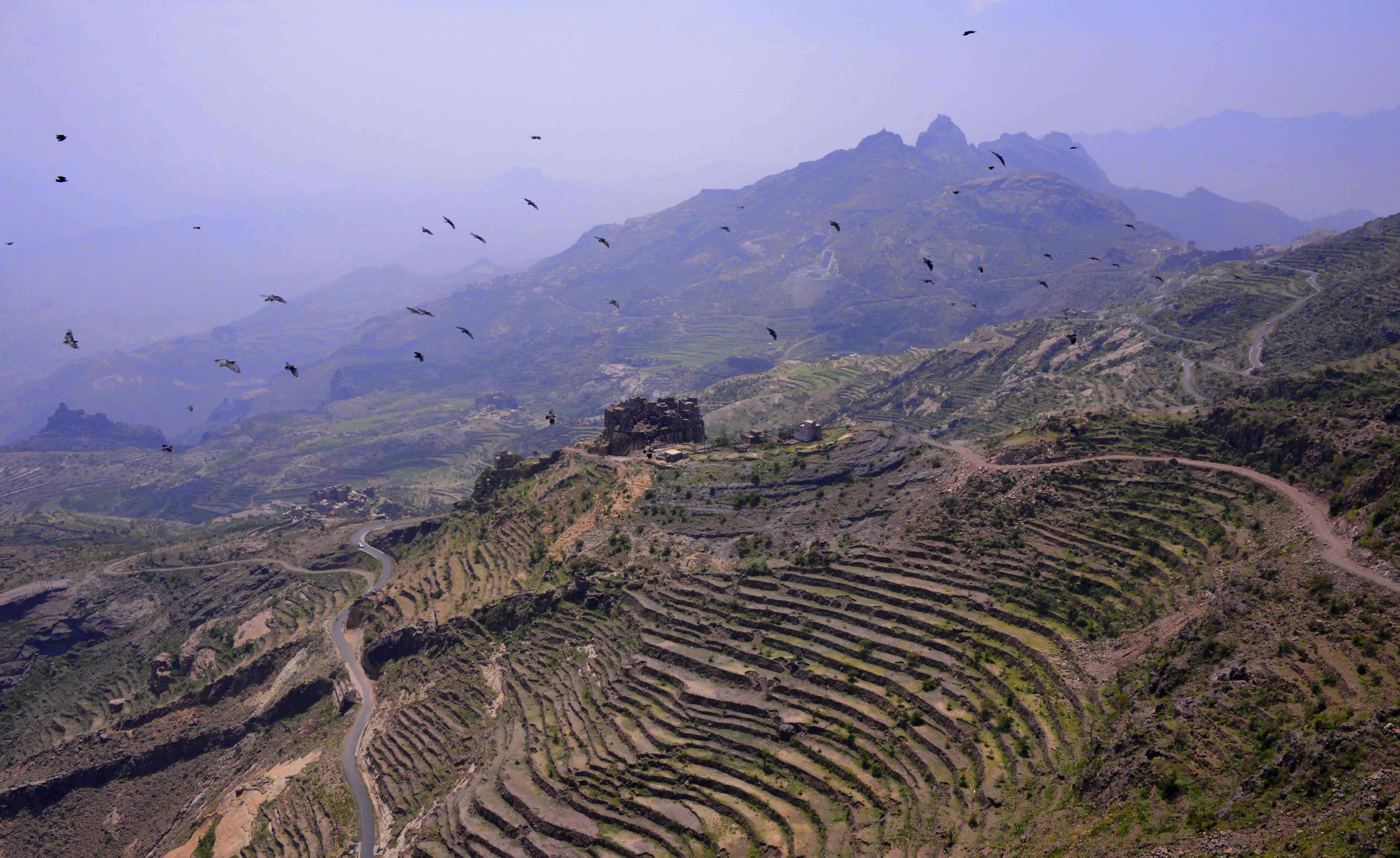 Haraz Mountains, Yemen